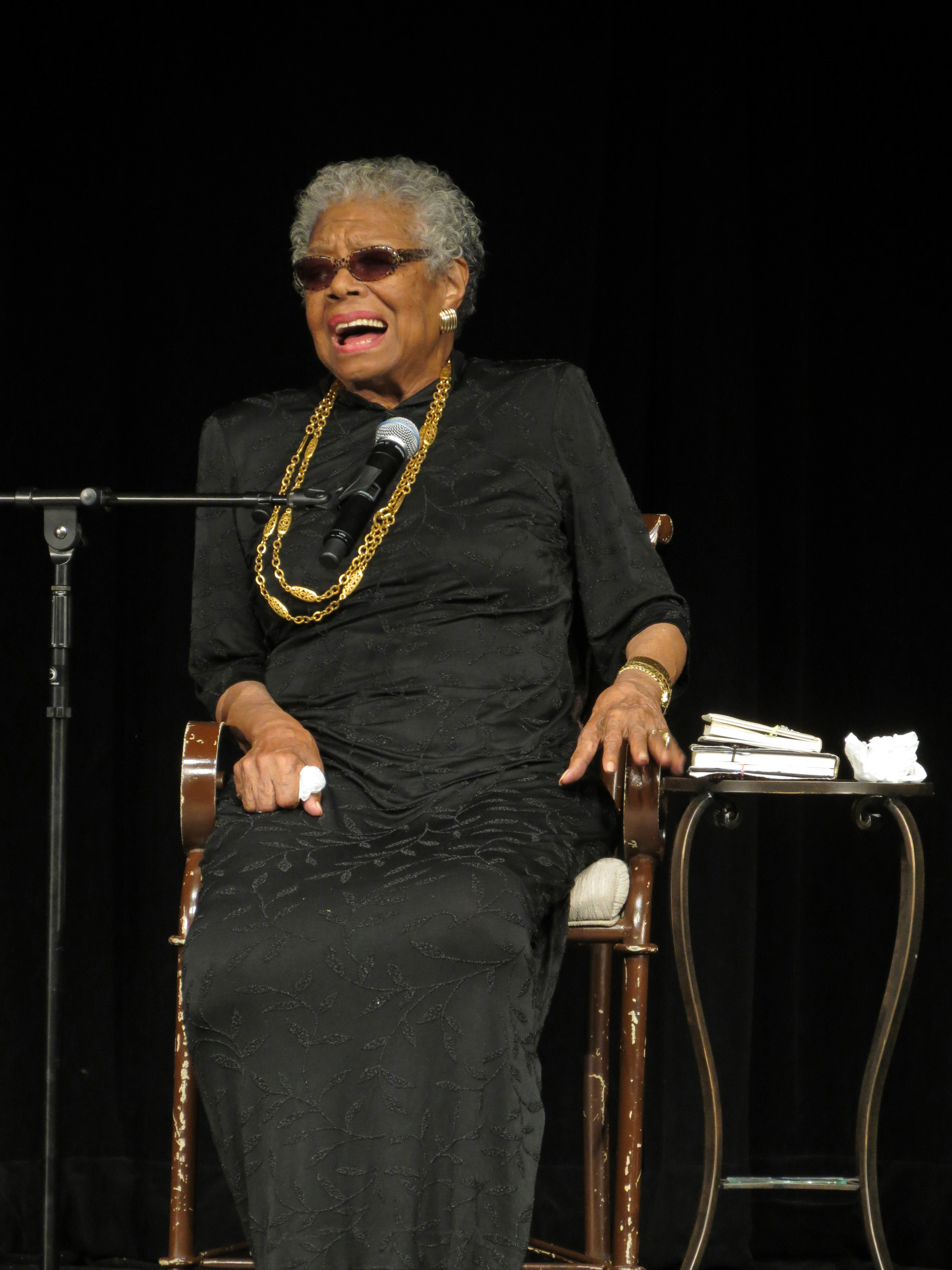 Maya Angelou at York College